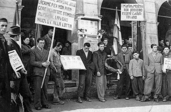 Funerali delle vittime dell'eccidio delle Fonderie Riunite di Modena